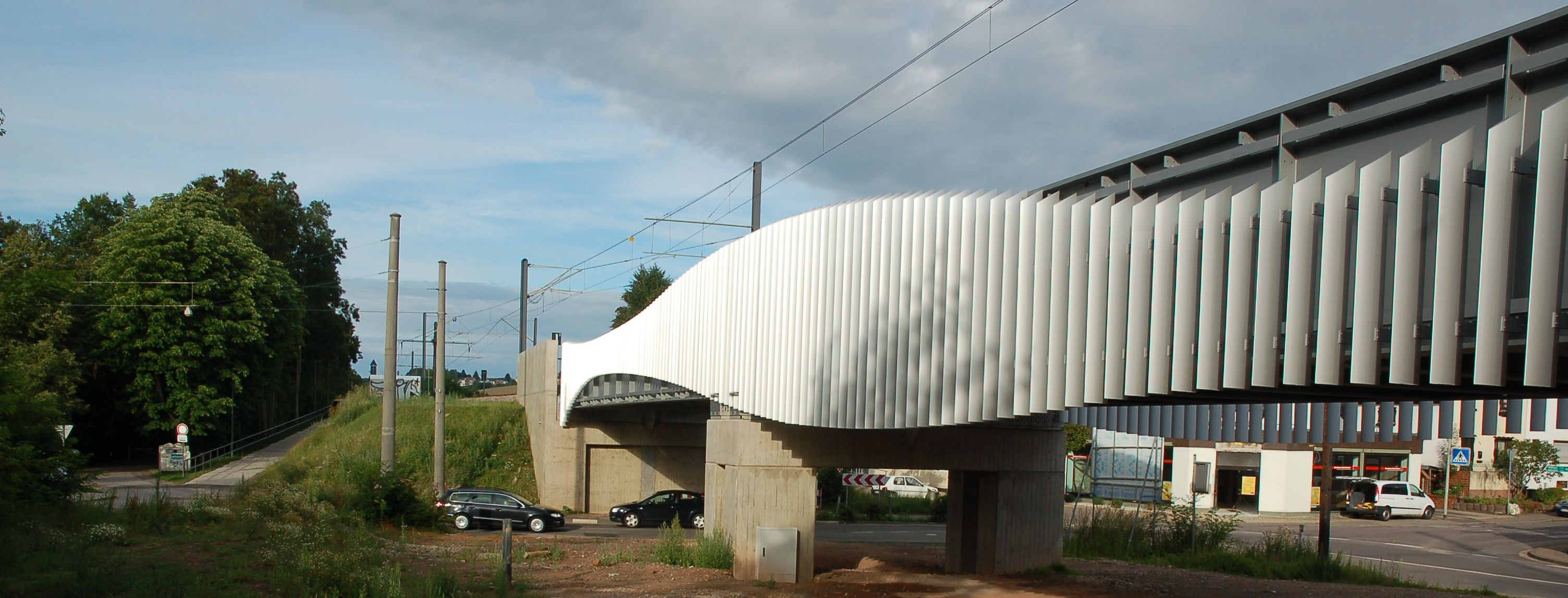 Die neue Bahnüberführung über die L136 - Links der Eingang zum „Schwarzen Weg“ zwischen dem Köllerbach und dem Bahndamm Richtung Etzenhofen sowie der Aufgang zur Saarbahn-Haltestelle „Walpershofen-Mitte“